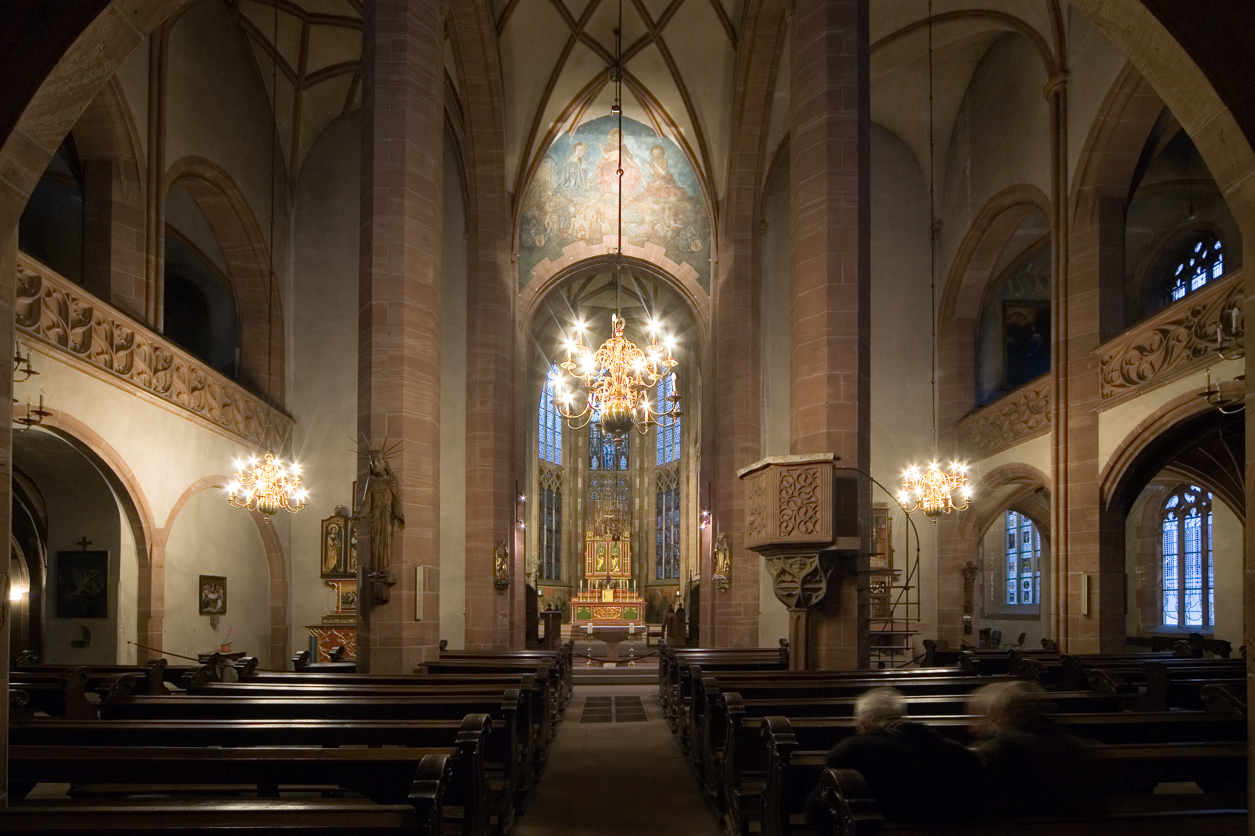 Totale des Hauptschiffs (von Westen) der Leonhardskirche in Frankfurt am Main. Selber fotografiert im März 2008, Doppellizensierung GFDL & CC-BY-SA 2.5. Ein Detailbild des Hochchores findet sich hier